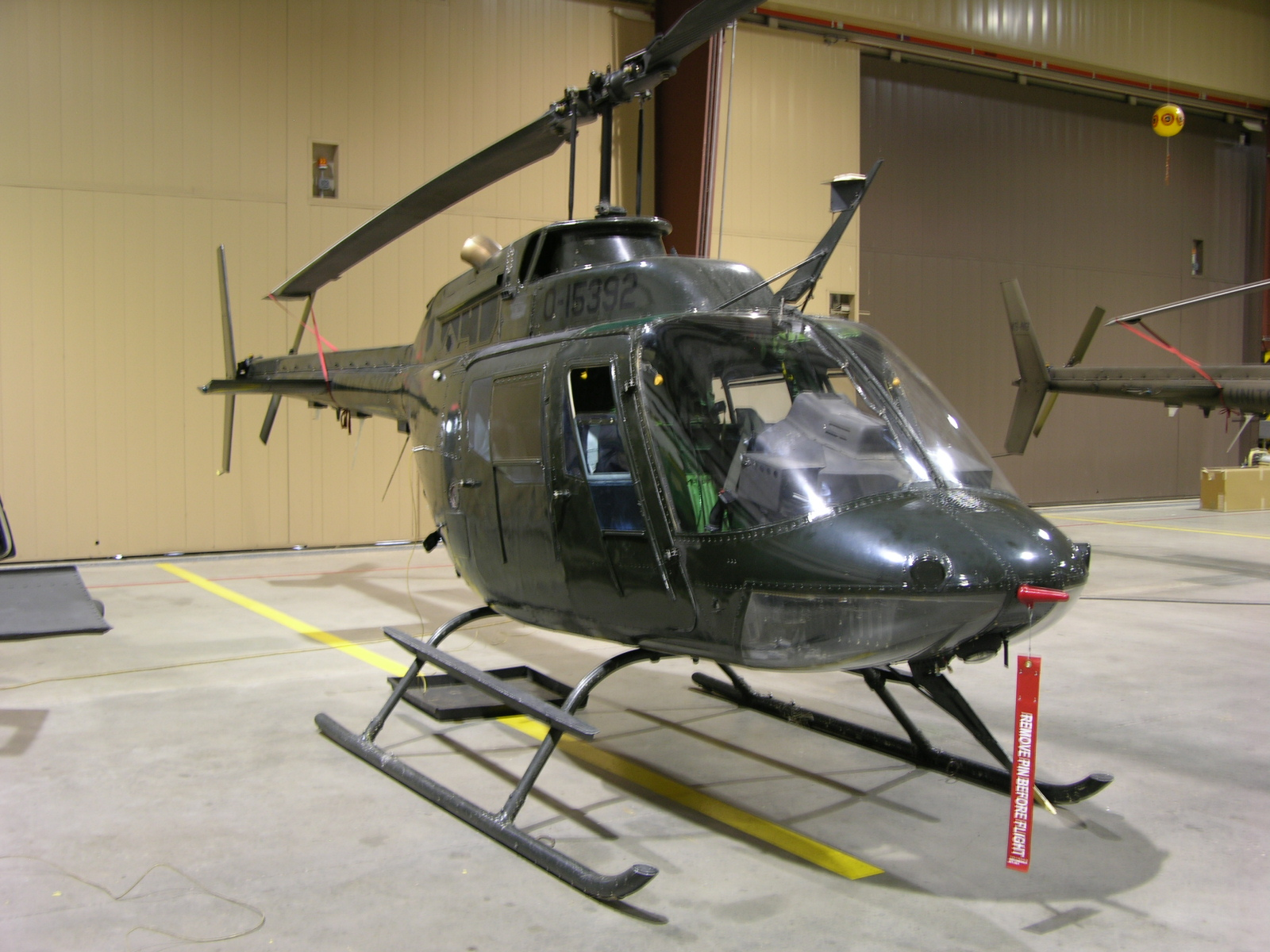 70-15392 OH-58A+ Kiowa